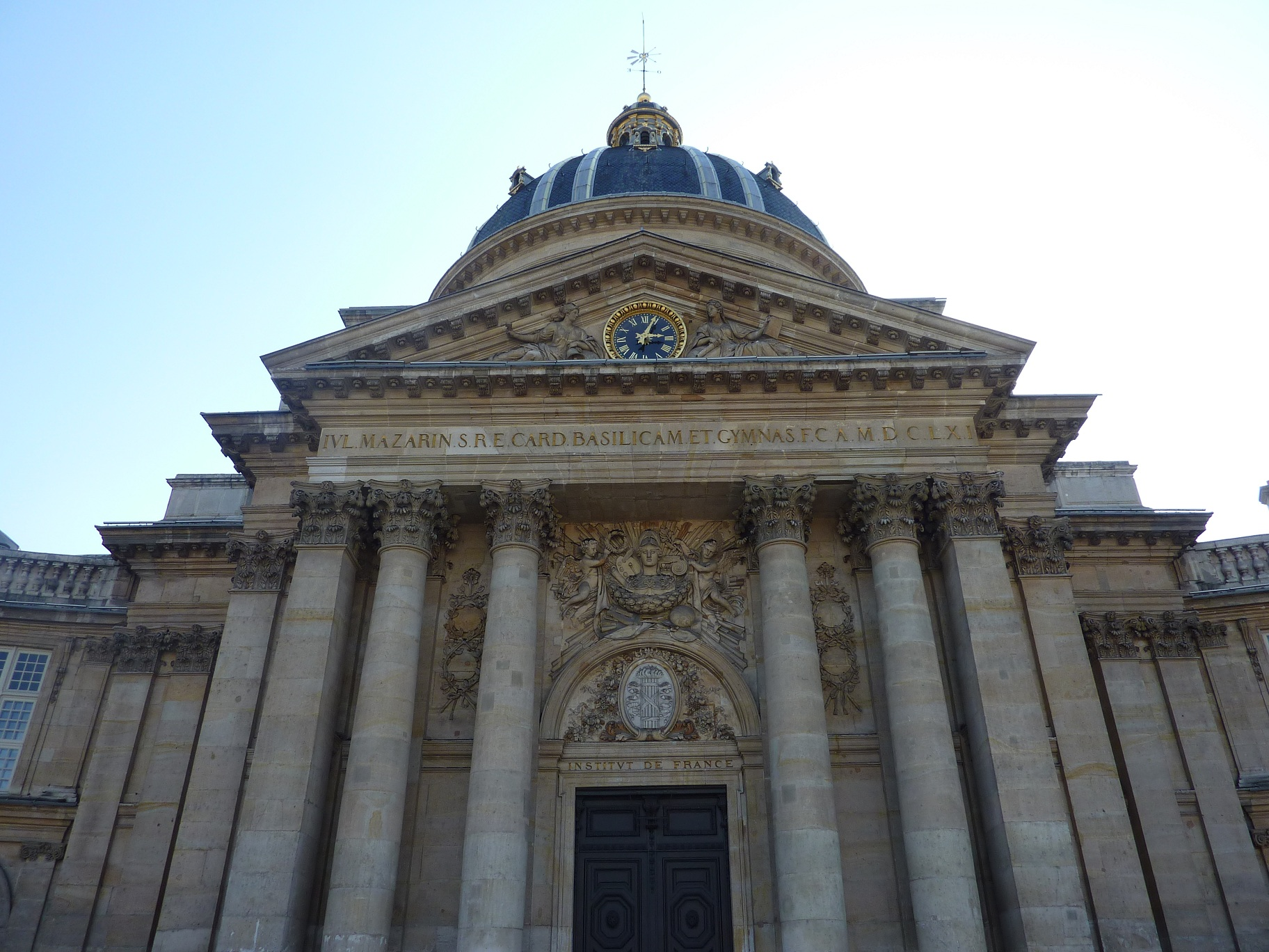 Académie de moral et de science politique de Paris crée en 1975.